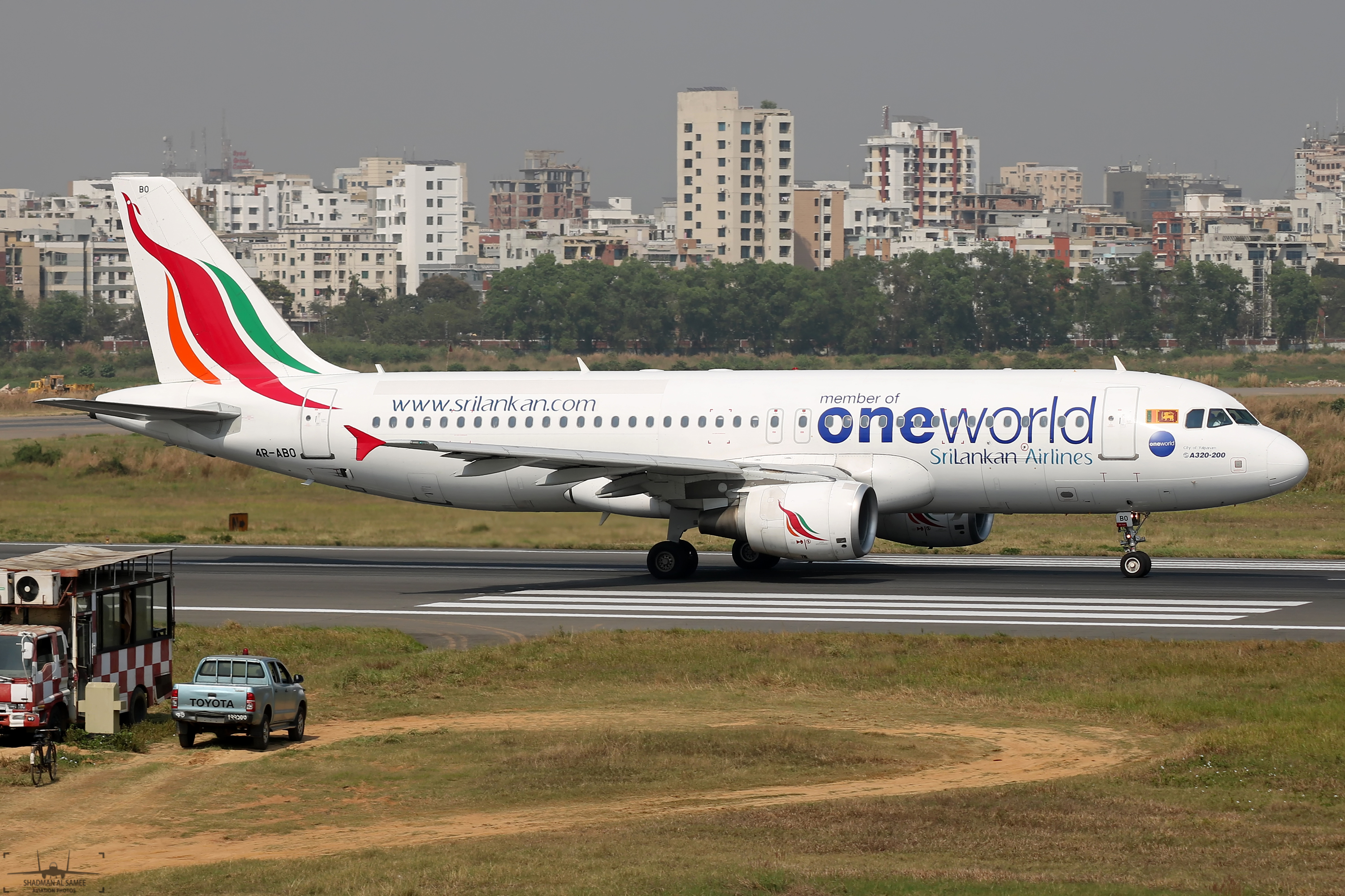 VGHS 2018.